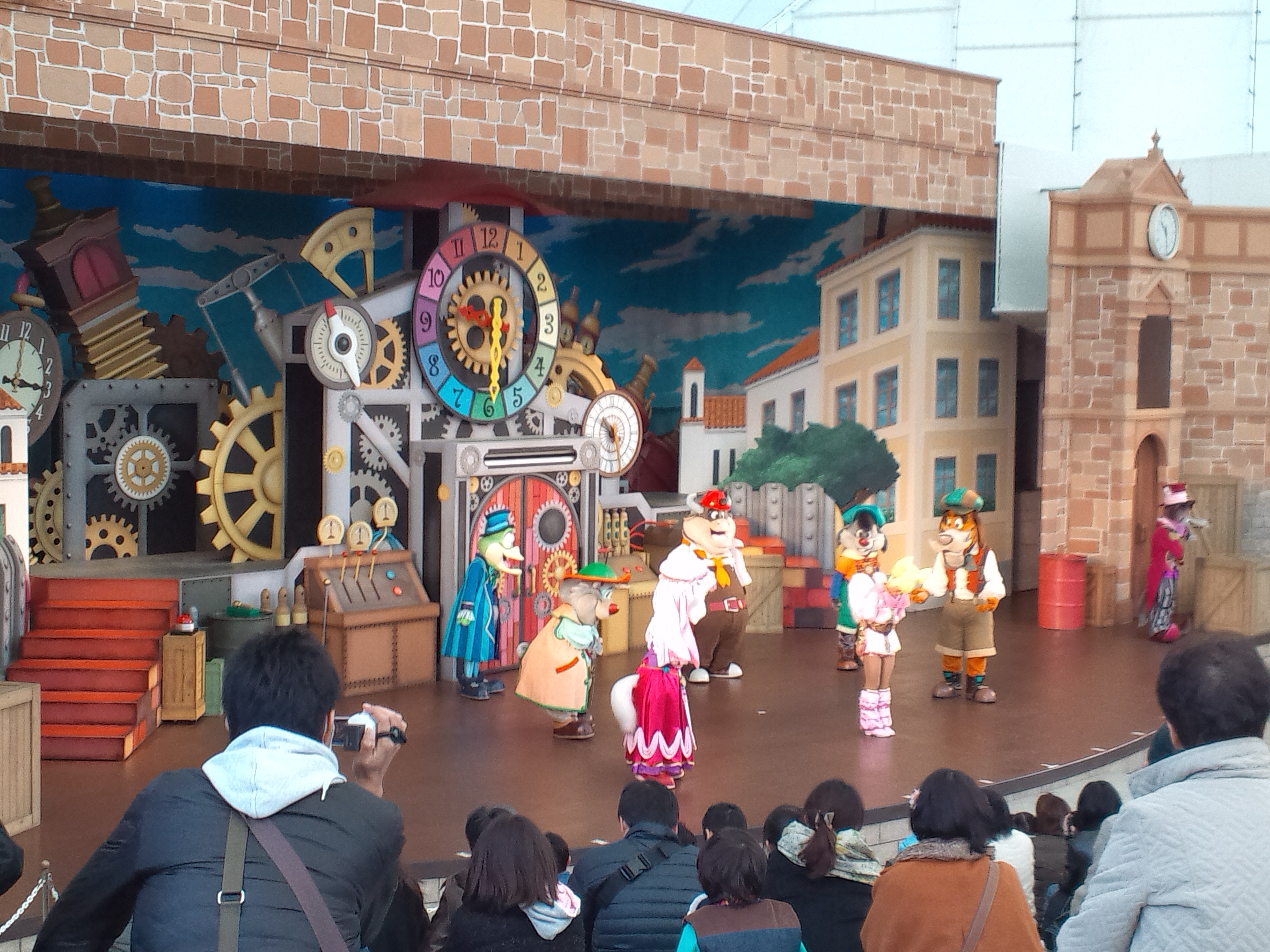 志摩スペイン村、パルケエスパーニャ コロシアム